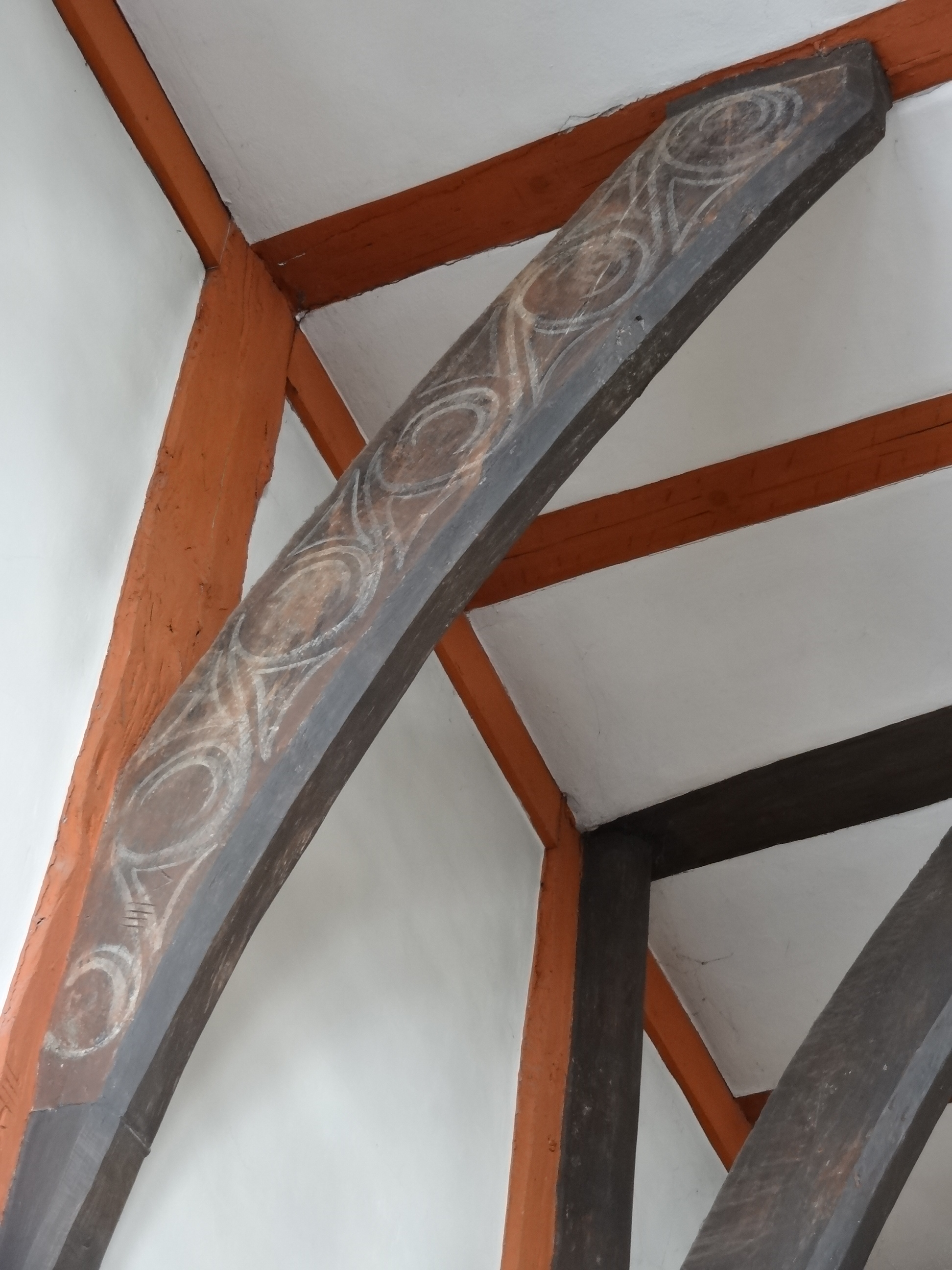 Ehemalige Hospitalkapelle St. Wendelin (Butzbach)